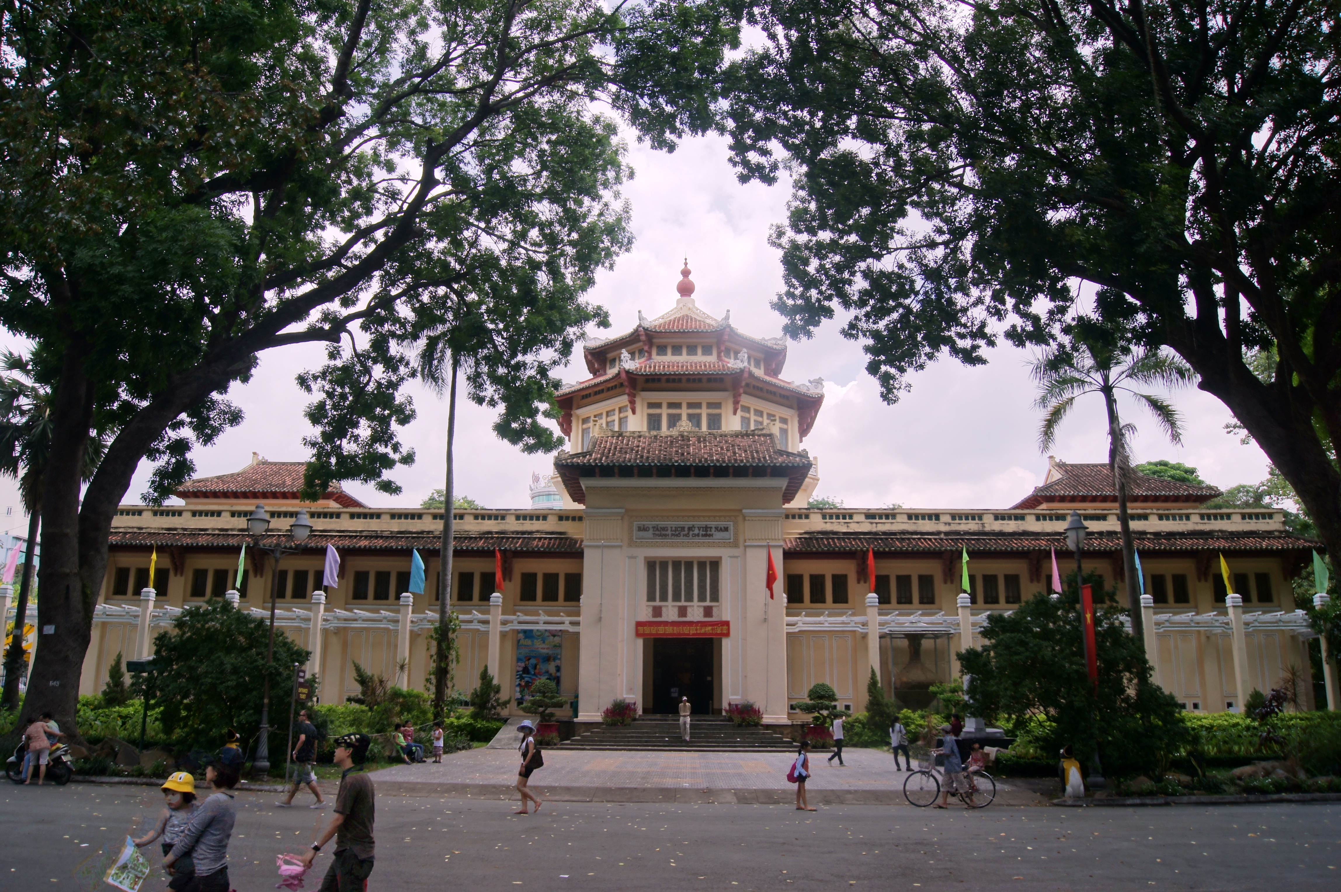 Toàn cảnh mặt chính diện Bảo tàng lịch sử Tp. Hồ Chí Minh.